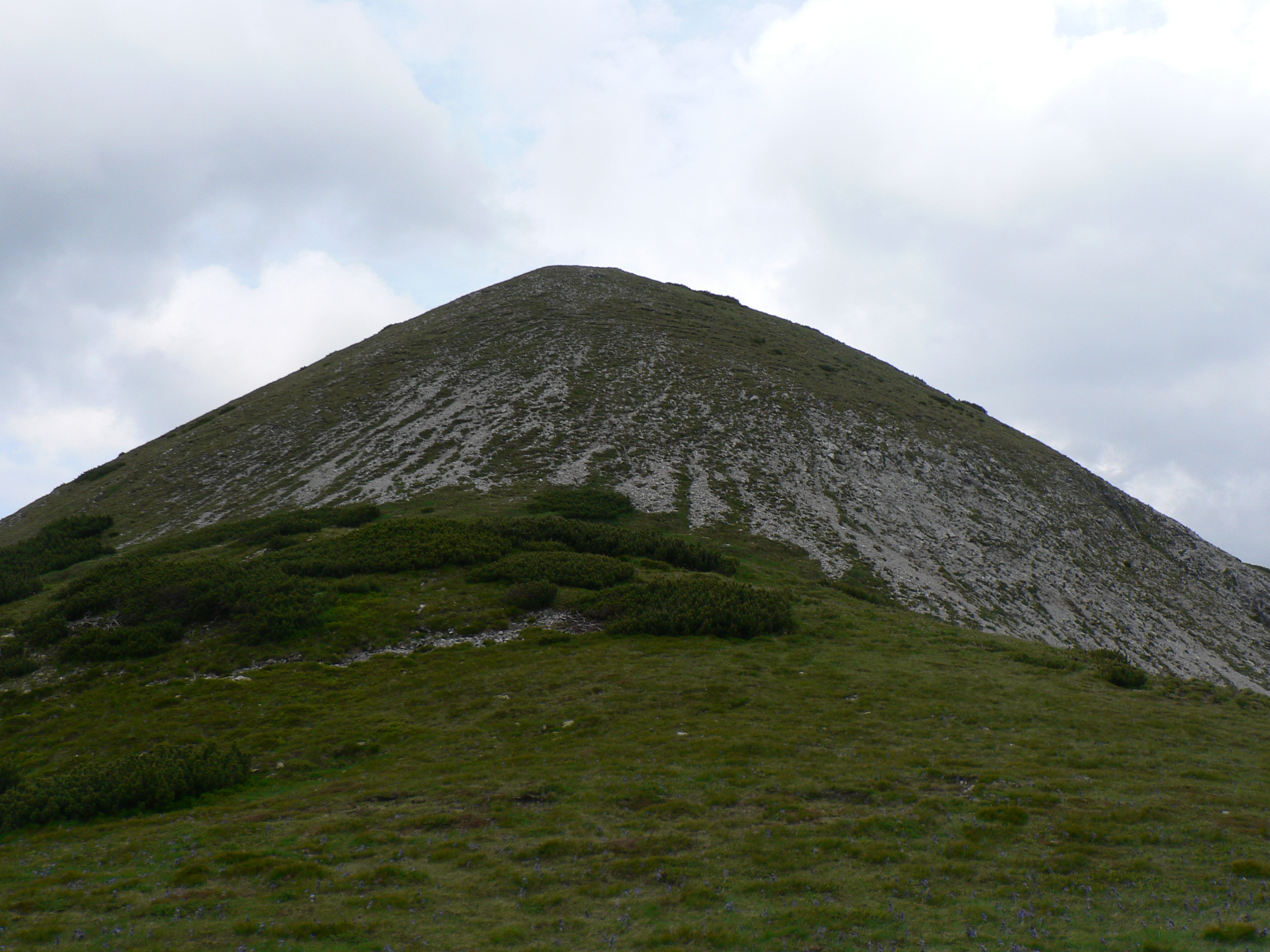 Widok na Bielską Kopę z Wyżniej Przełęczy pod Kopą